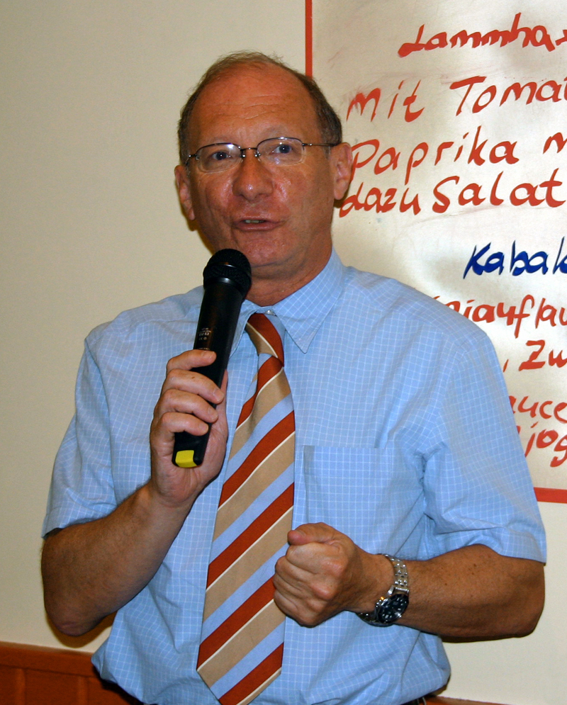 Franz Maget, bayerischer SPD-Politiker und Landtagsabgeordneter.